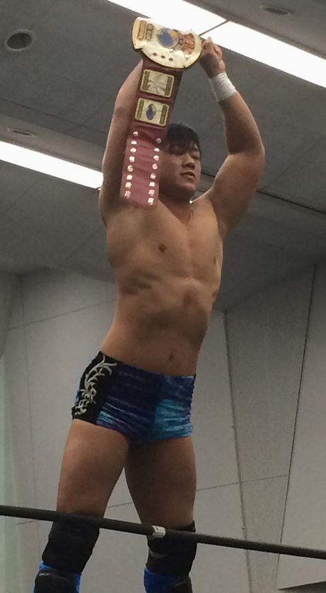 港区民ホール